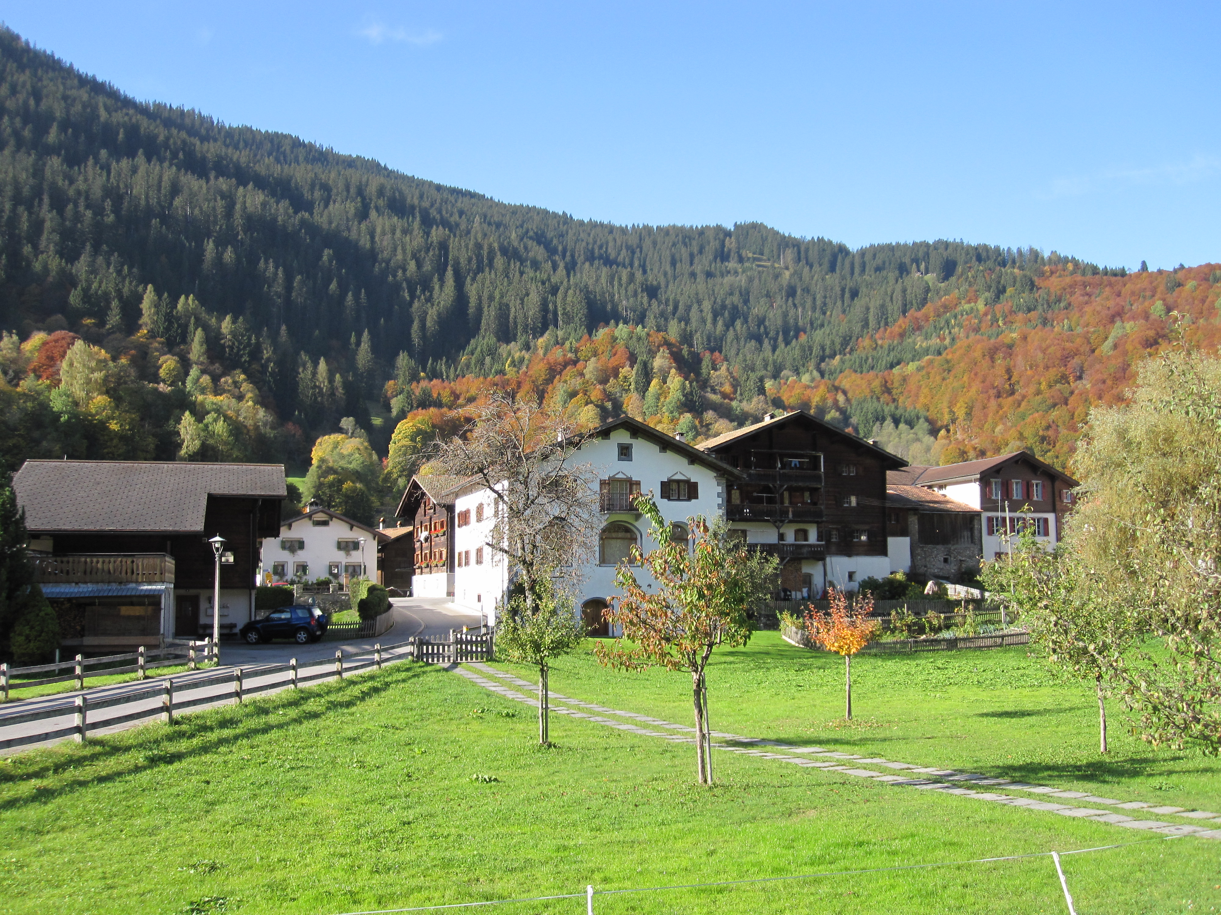 Dorfeingang Serneus (politisch zu Klosters-Serneus gehörig)